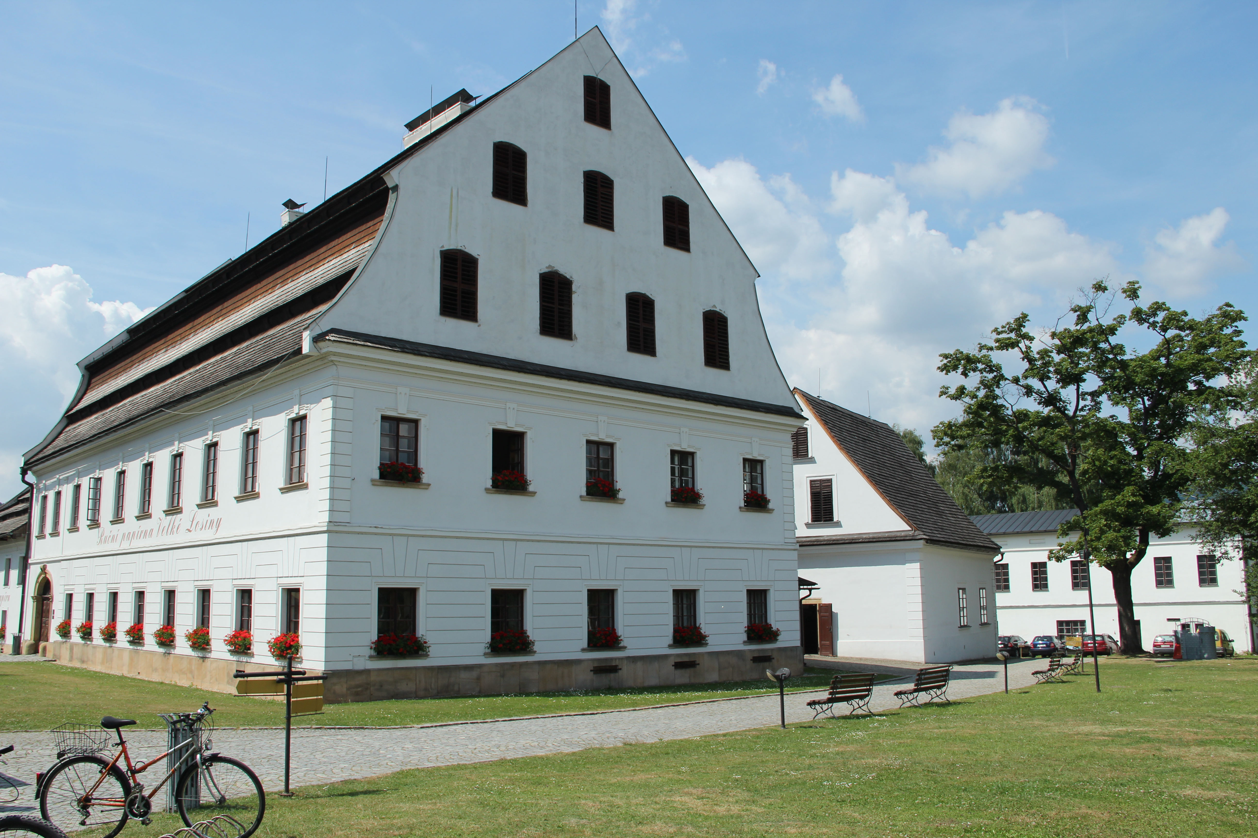 Papírna, Rudé armády 9, Velké Losiny.